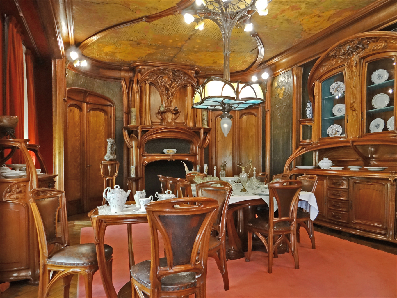 Salle à manger Masson 1903-1906 Eugène Vallin (1856-1922), architecte, concepteur du mobilier Victor Prouvé (1858-1943), sculpture de la cheminée, panneaux de cuir à décor de rosiers, plafond peint sur toile marouflée. Acajou blond, cuir repoussé peint et doré, verre soufflé-moulé, bronze, peinture sur toile. Musée de l'Ecole de Nancy Cette salle à manger a été commandée à Eugène Vallin par Charles Masson, beau-frère d'Eugène Corbin pour son appartement de Nancy. C'est l'ensemble le plus complet du musée, il a été donné par la veuve Marie Masson en 1938 site de l'Ecole de Nancy